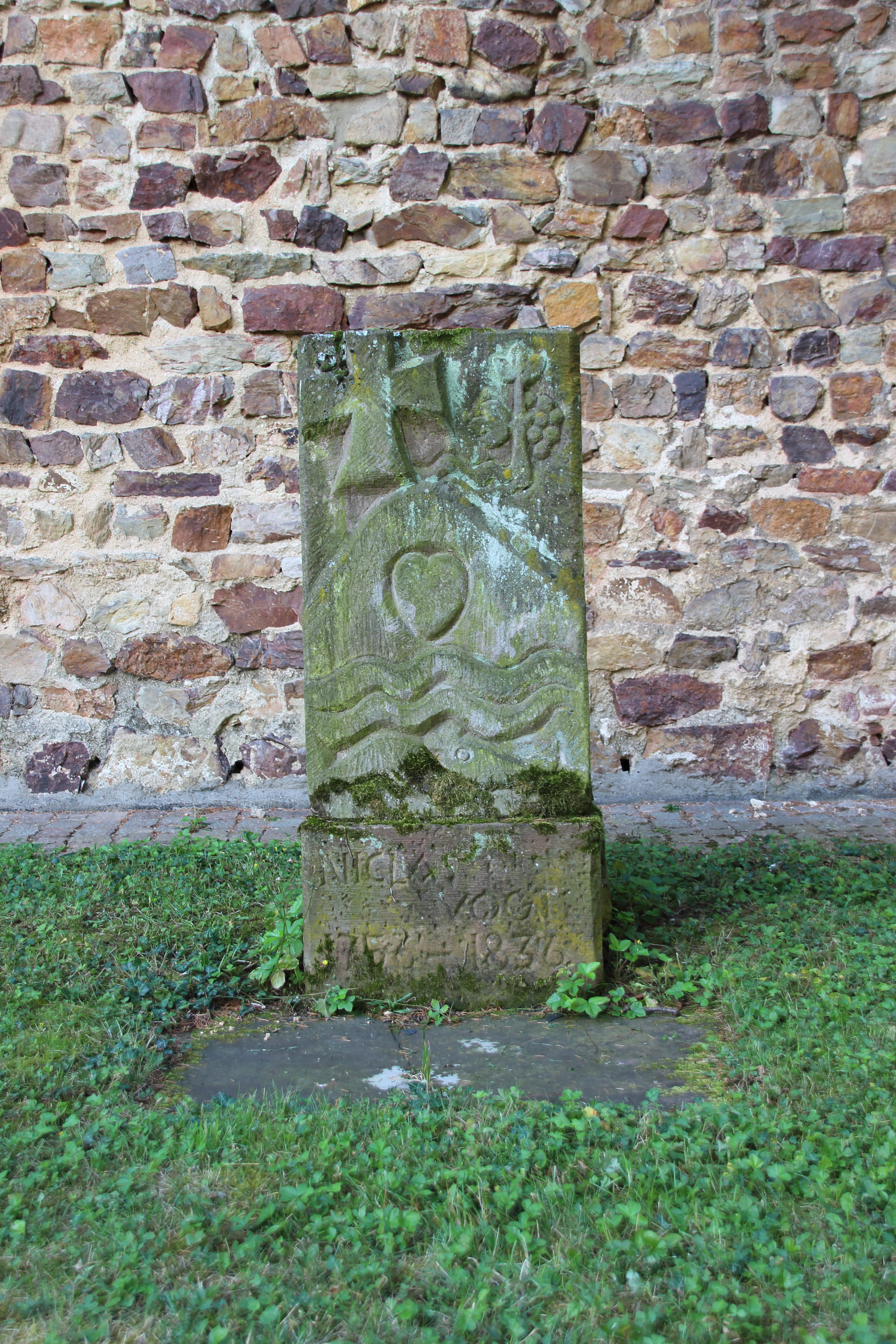 Grabmal von Niclas (Nicolaus) Vogt (1756-1836). Vogt war Historiker, Staatstheoretiker und Politiker. Klemens Wenzel Lothar von Metternich stiftete seinem Lehrer diesen Grabstein. Schloss Johannisberg im Rheingau.